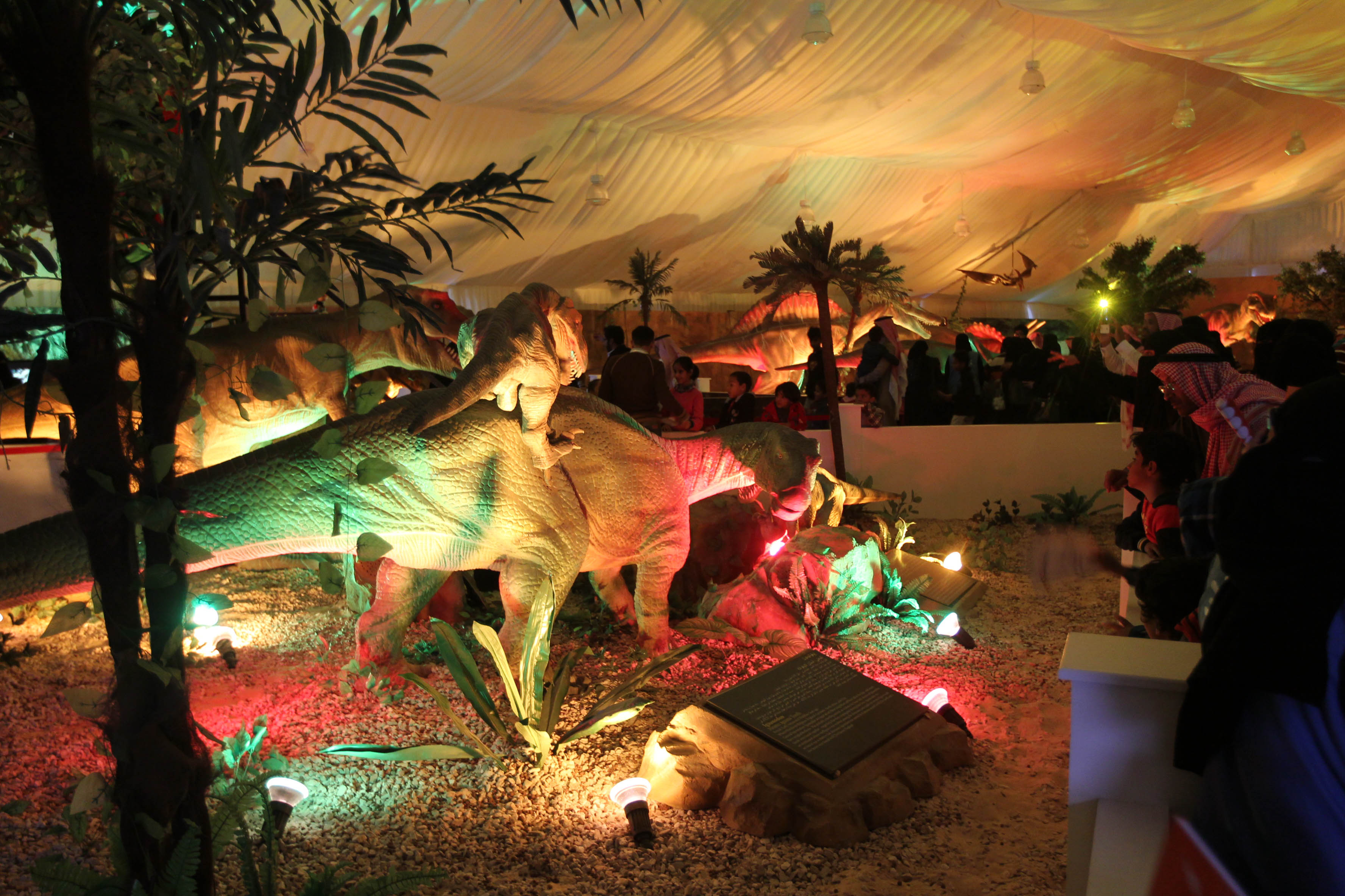 خيمة واحة الديناصورات في برنامج أرامكو السعودية الثقافي 2012